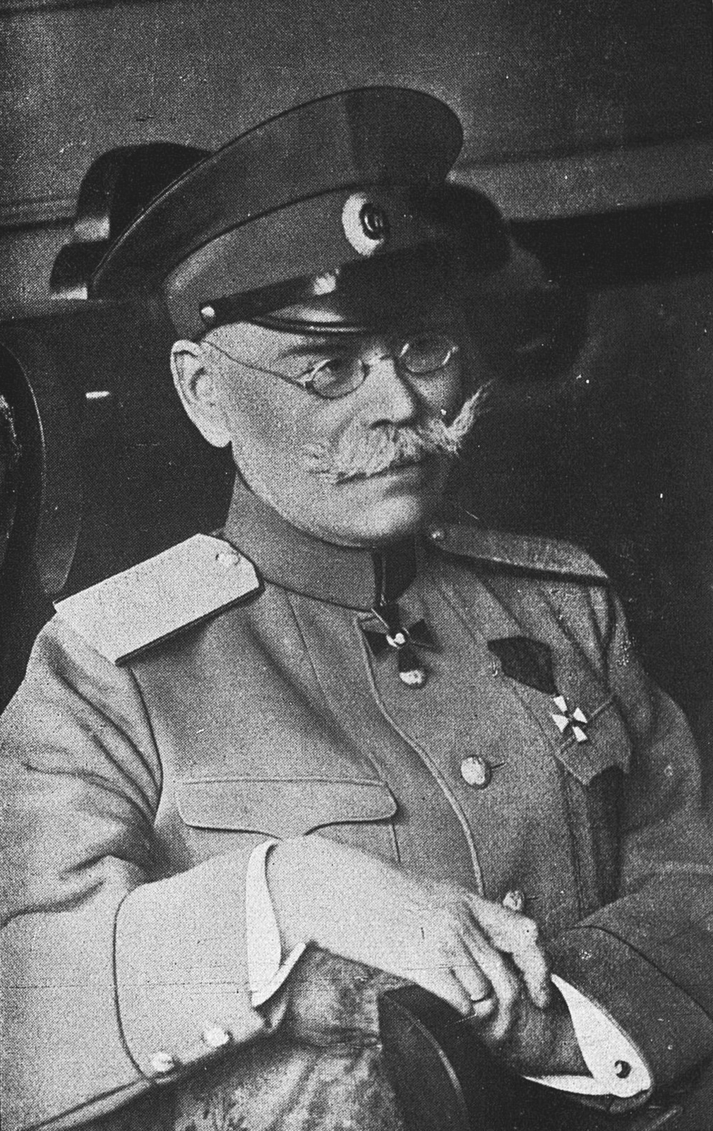 Генерал М. В. Алексеев.